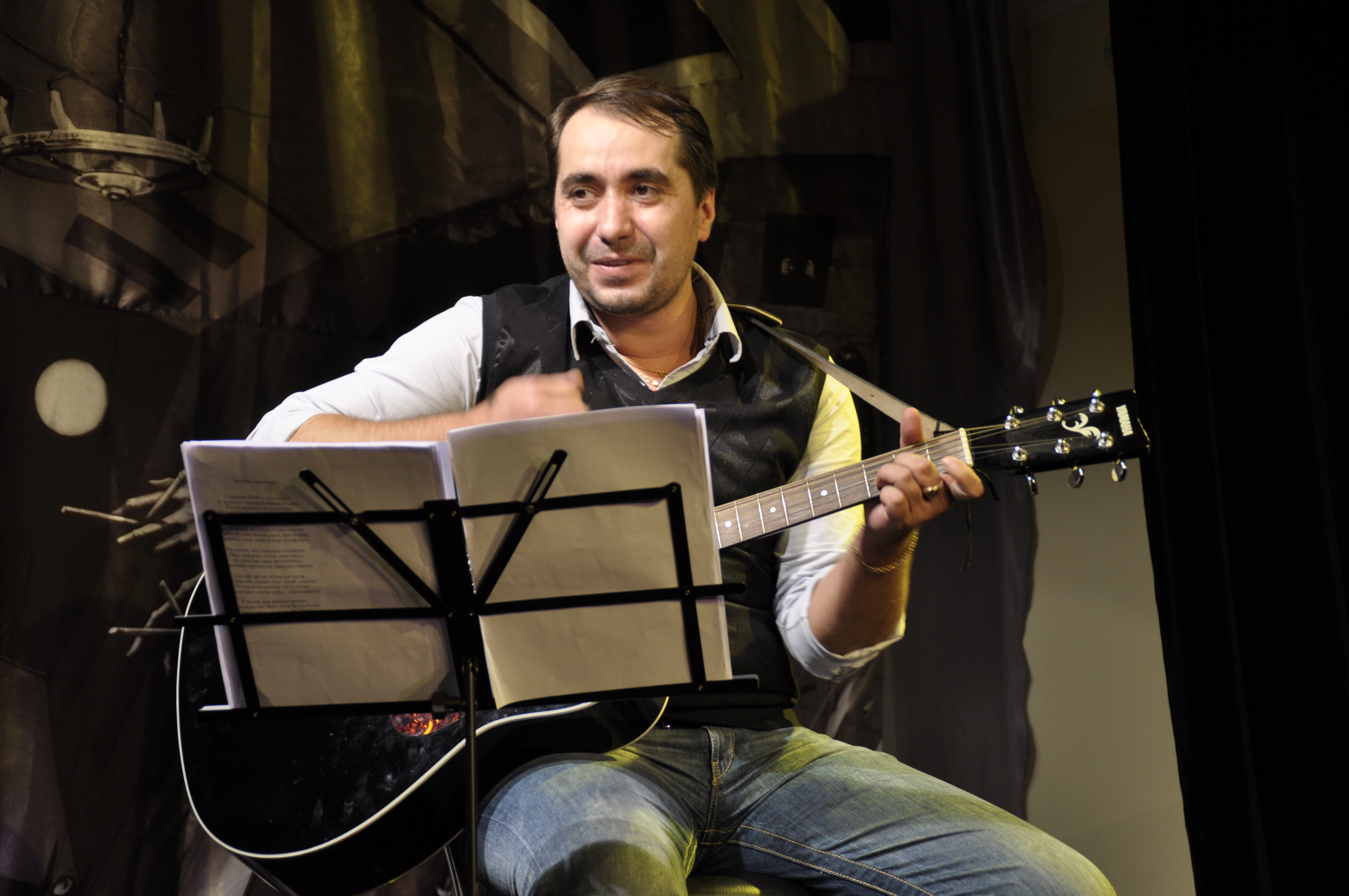 Алексей Курилко на своём творческом вечере в театре импровизации "Чёрный квадрат" в г. Киев, в 2009 году